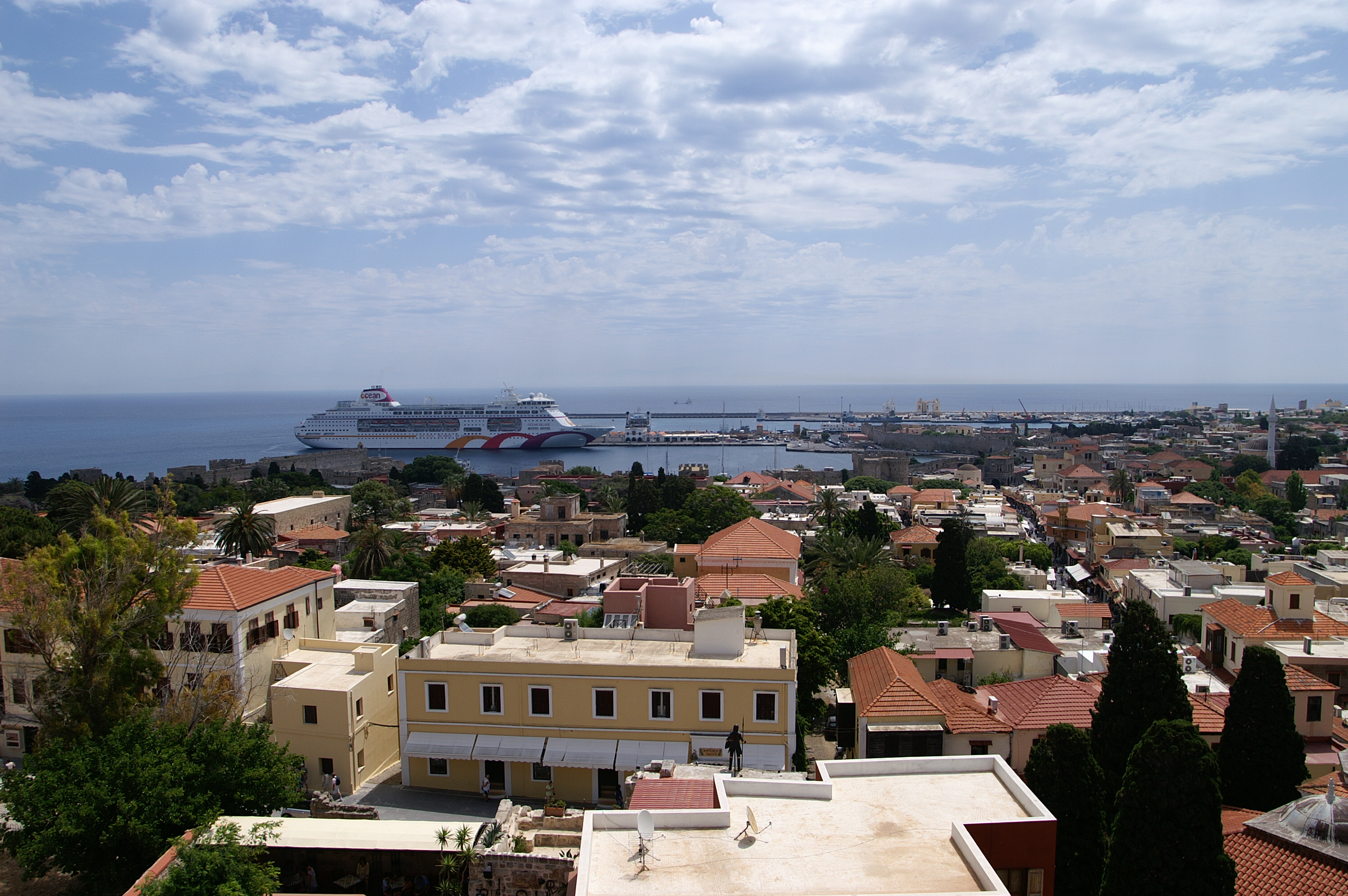 Blick vom höchsten Punkt auf dem Glockenturrm des "ROLOI" Uhrturm in der Altstadt von Rhodos.